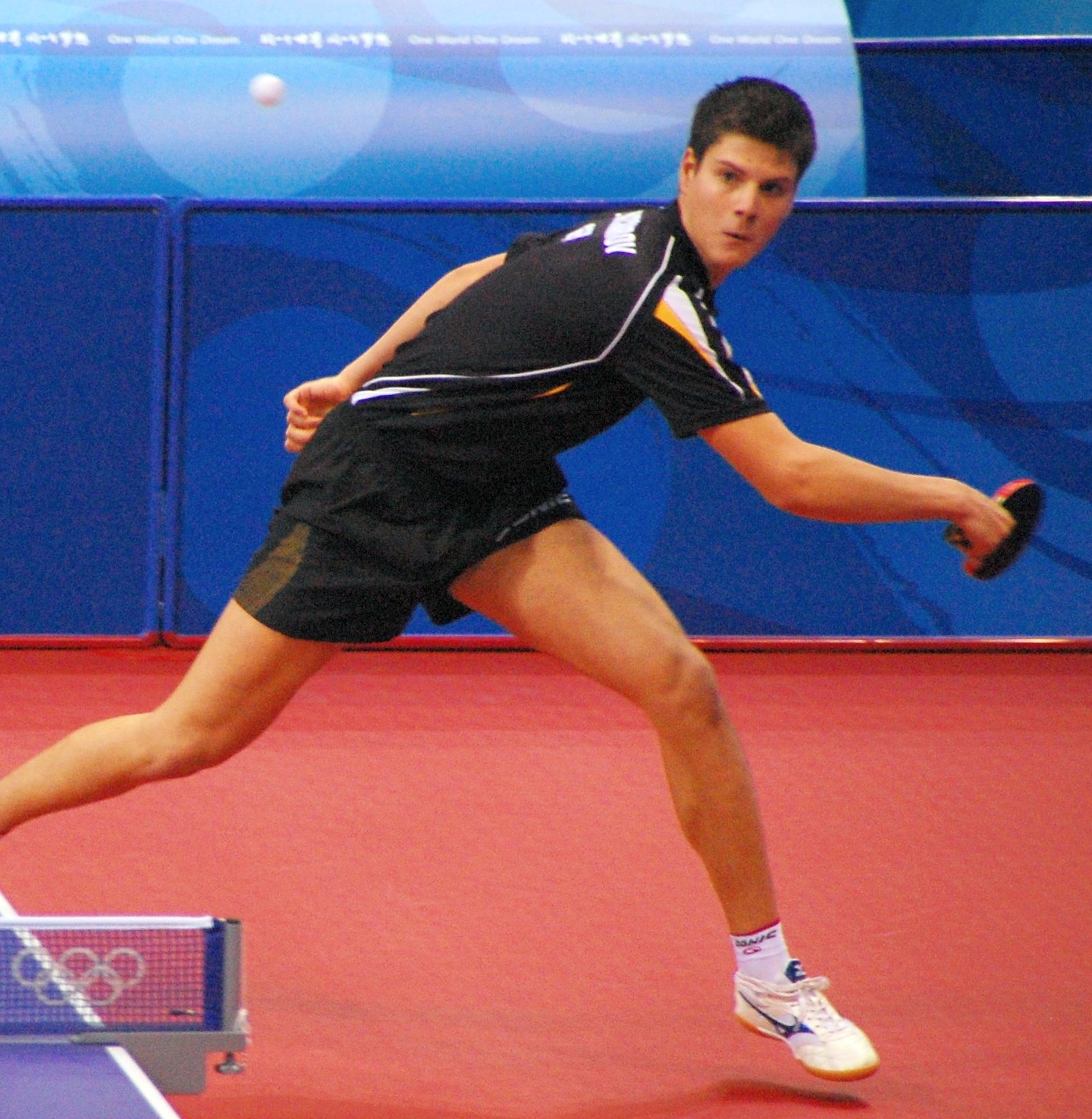 Demitri lost against Ko Lai Chak